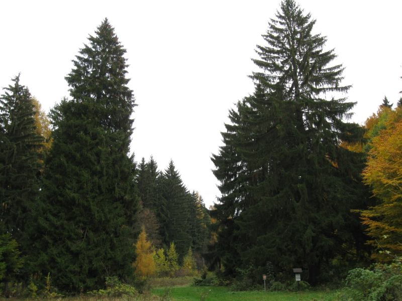 Tři smrky u Ruprechtova